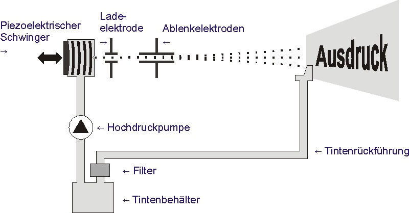 Prinzip des CIJ-Druckers.